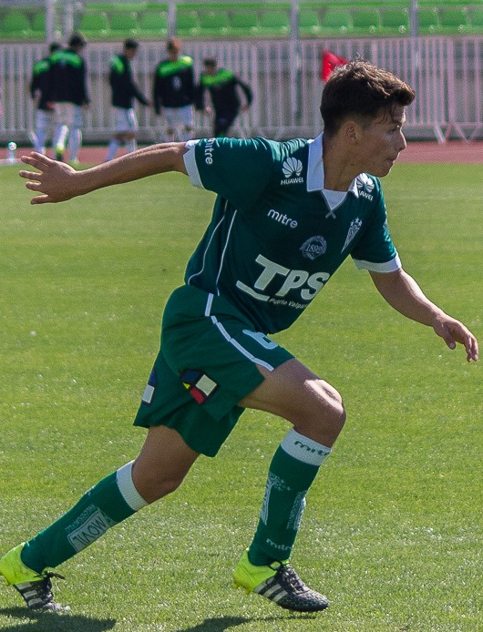 Fotografía del jugador de fútbol Kevin Vasquez en el Santiago Wanderers.